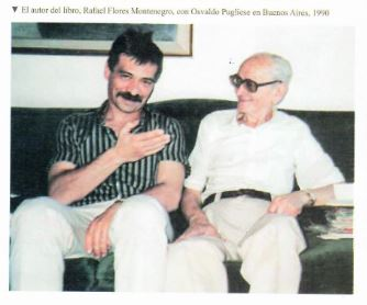 Gira Osvaldo Publiese en Buenos Aires